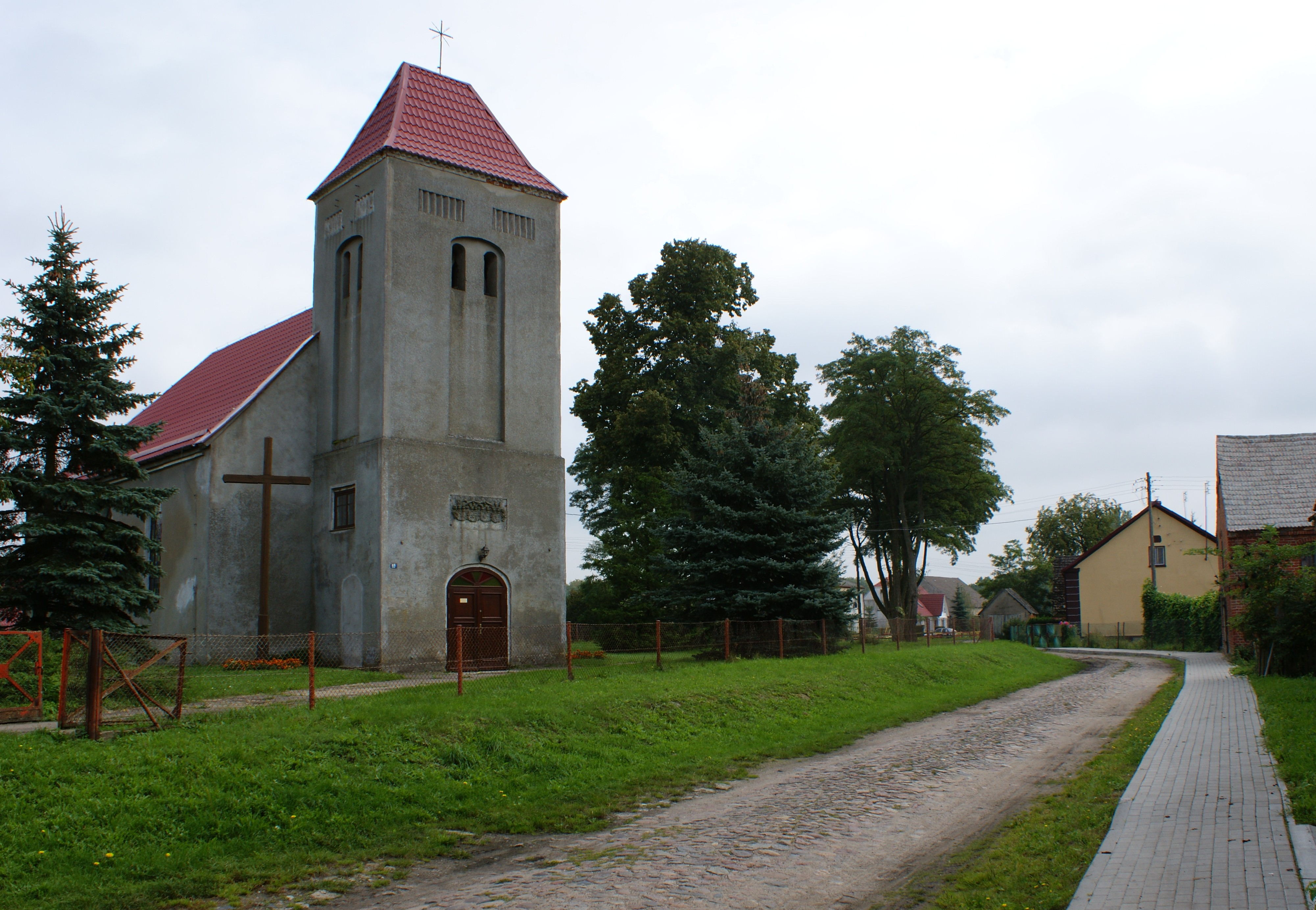 Rogowo - dawny kościół ewangelicki, obecnie rzymskokatolicki filialny p.w. św. Michała Archanioła, 1696, 1870